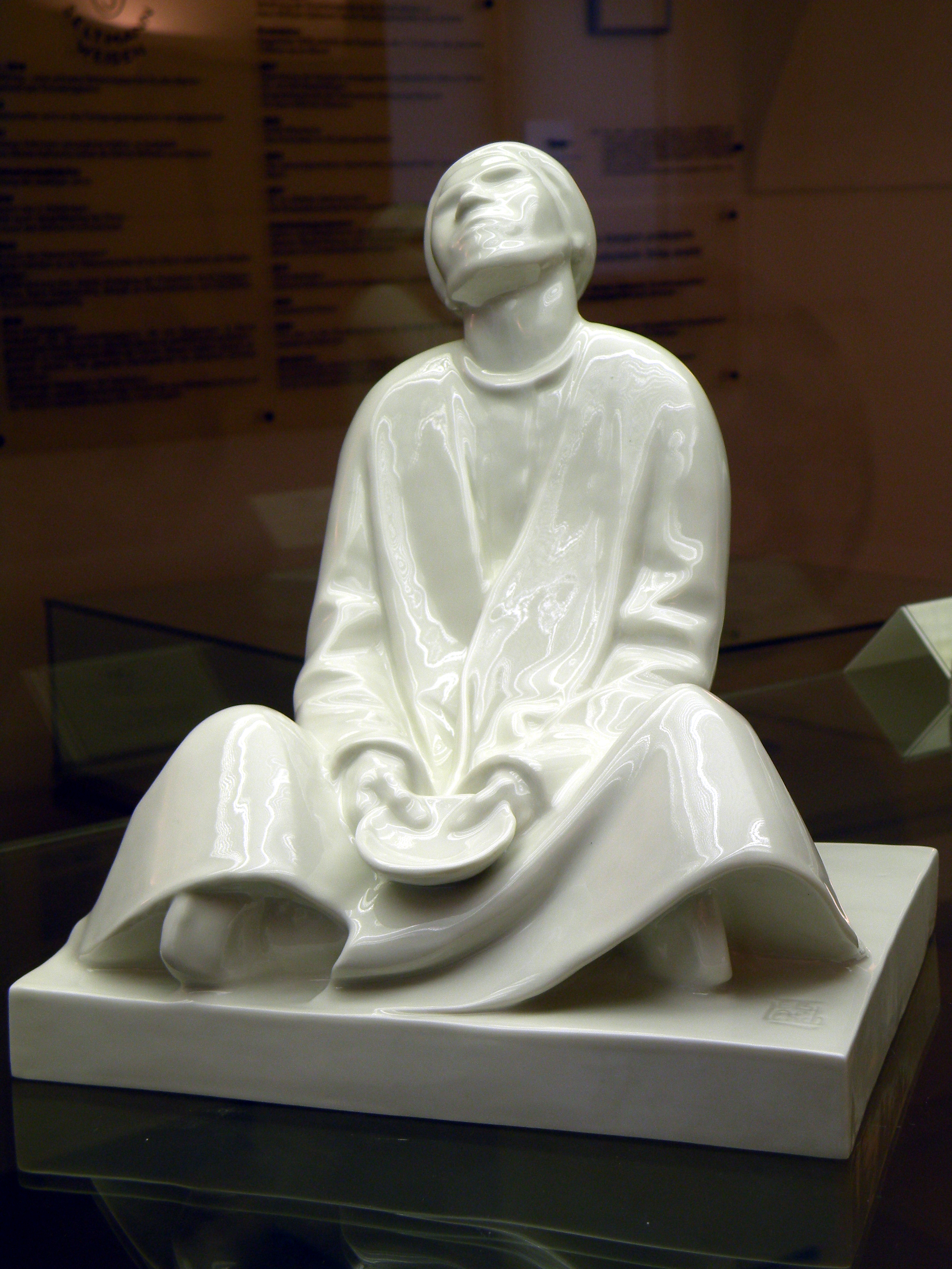 Копия скульптуры Барлаха